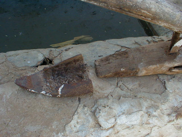 Detail de soc d'araire Walon: shabot d' bwès po n' nén uzer l' schî d' l' eraire